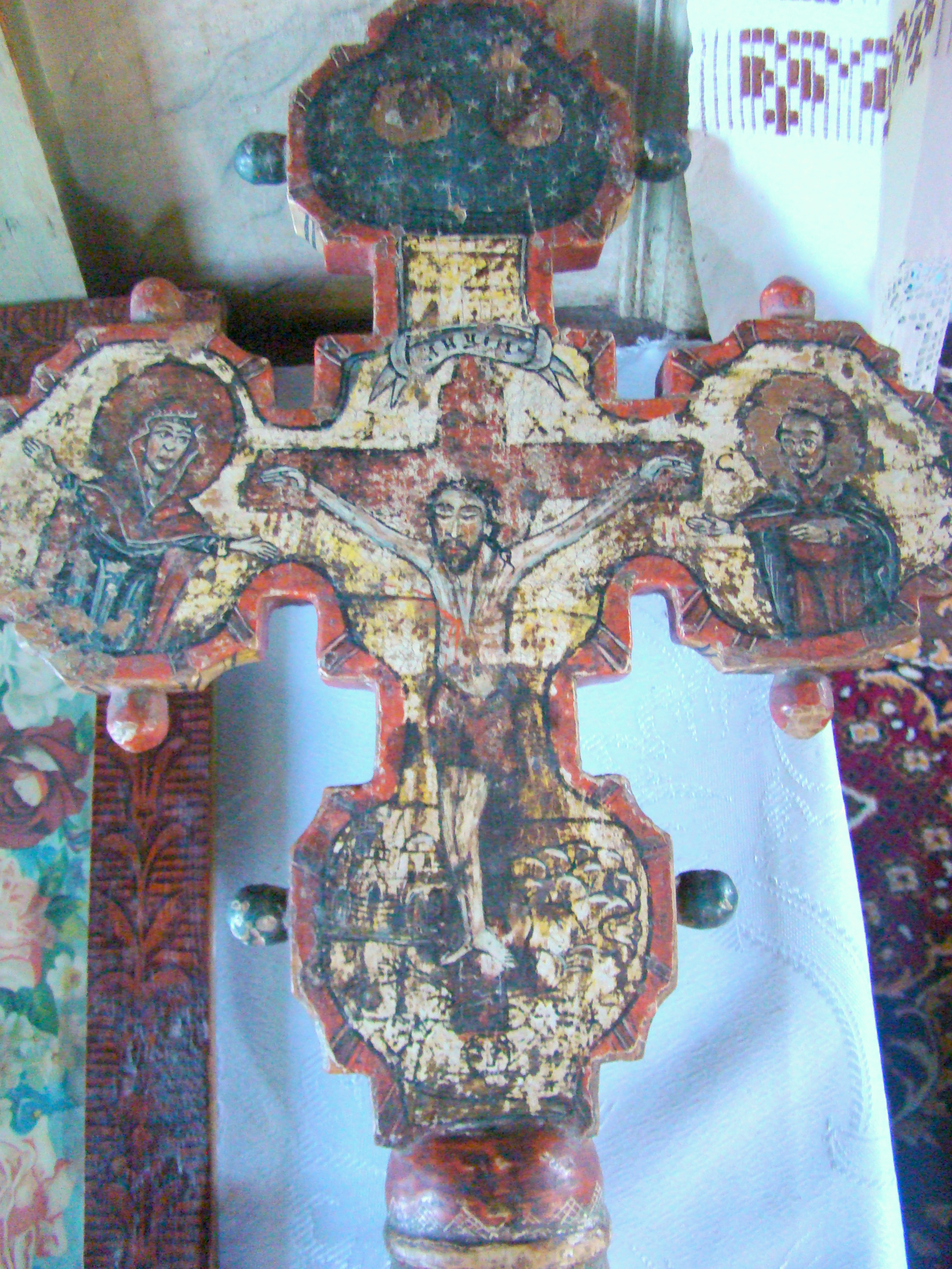 Biserica de lemn “Învierea Domnului” din Cubleșu, județul Sălaj